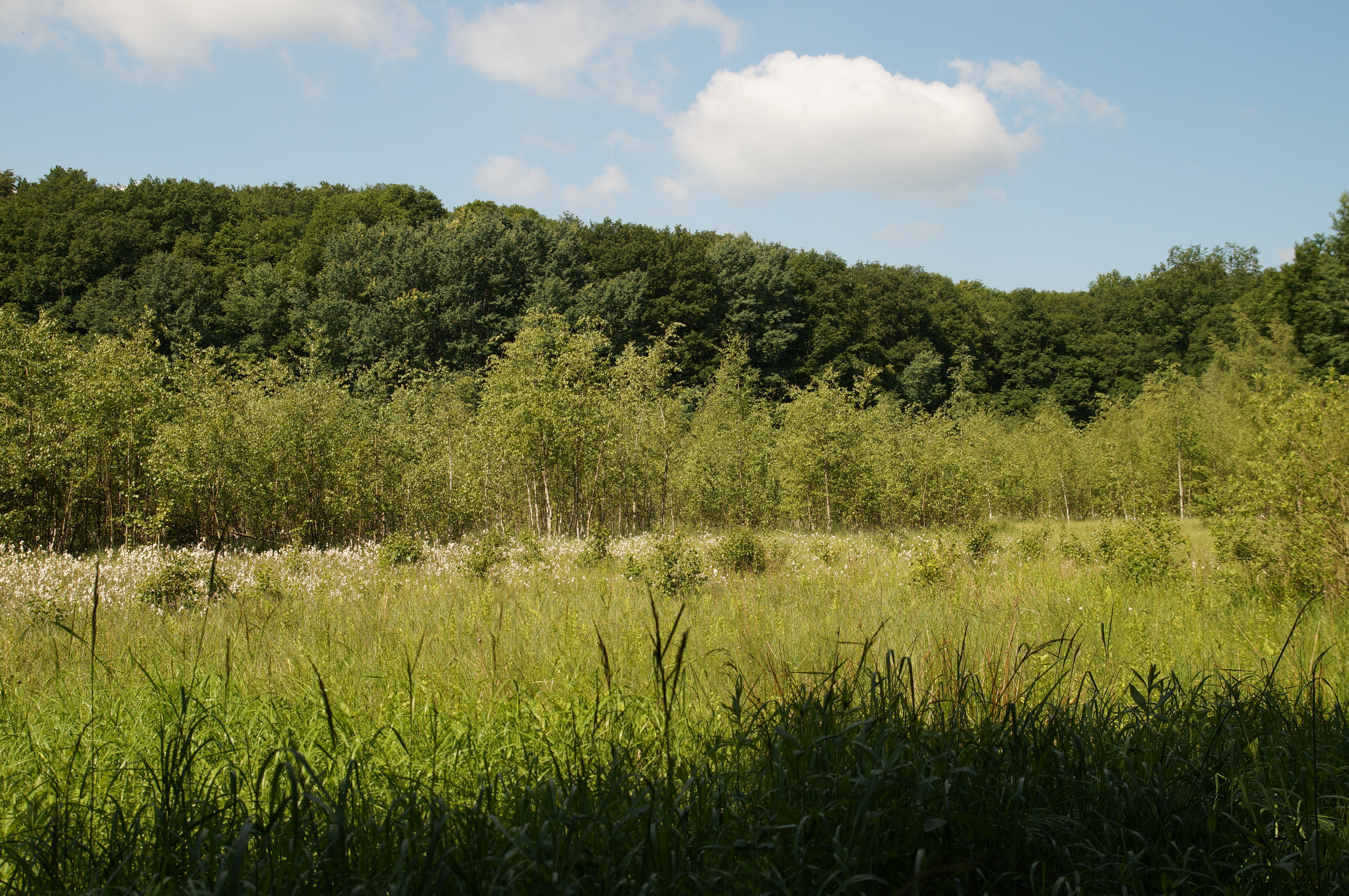 Hochmoor Hanfsee - Totalreservat im NSG Sonder (Unstrut-Hainich-Kreis/Thüringen)